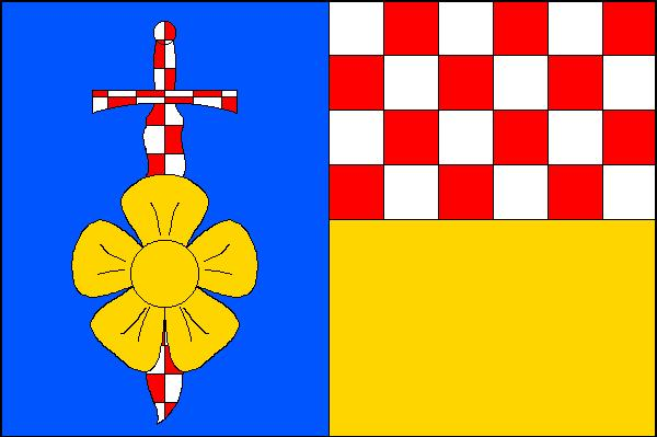 Vlajka obce Moravskoslezský Kočov